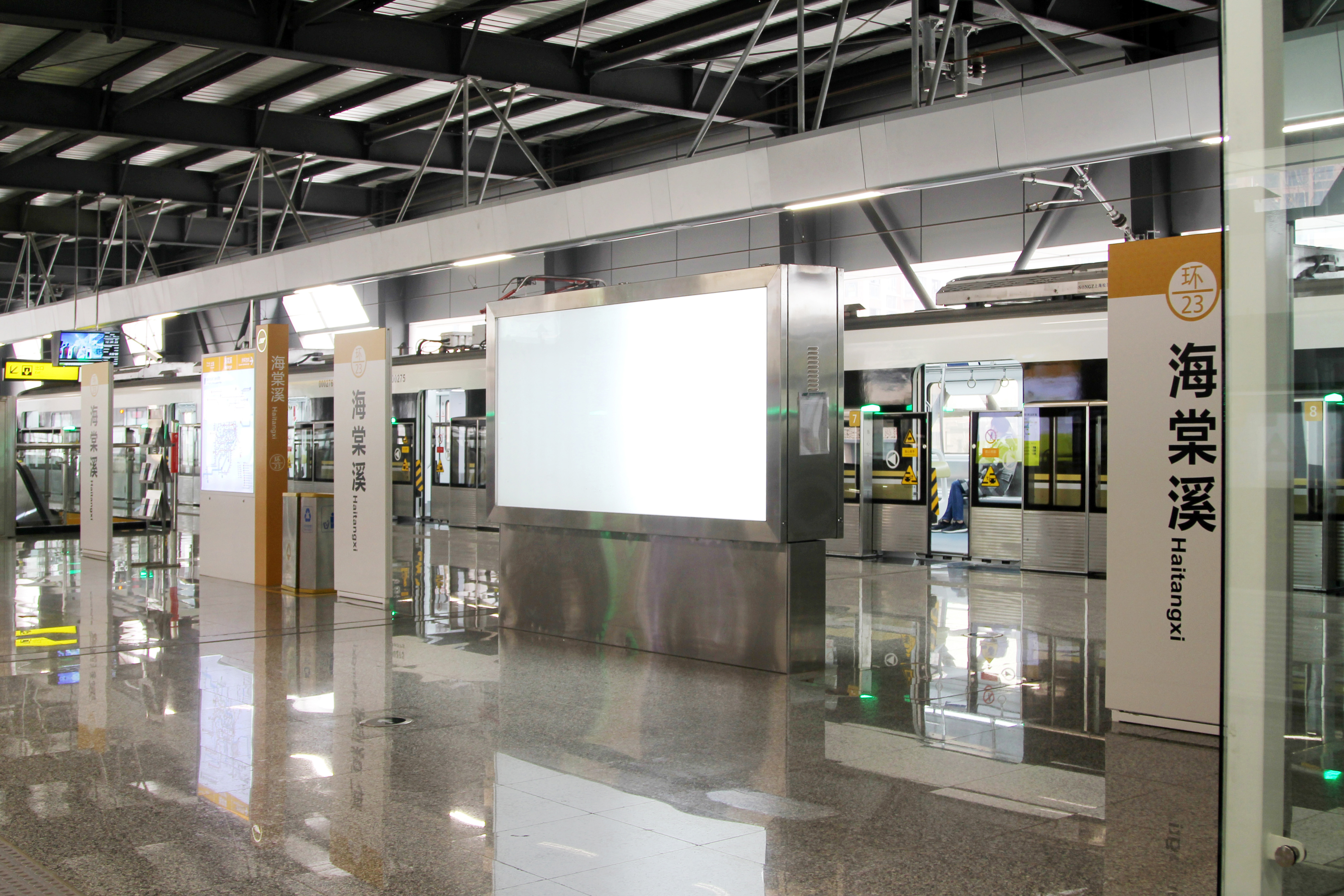 中文（中国大陆）: 环线海棠溪站站台